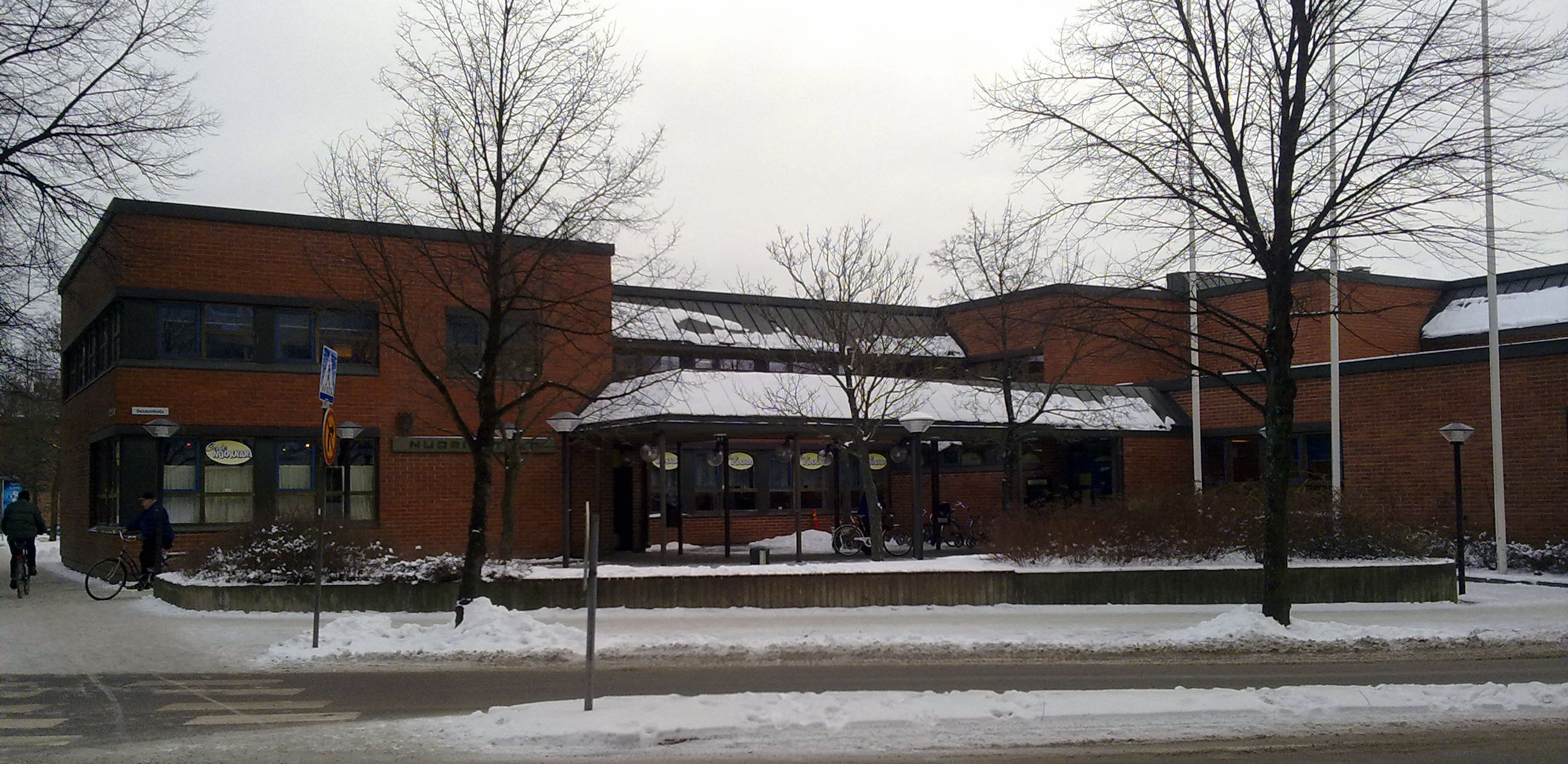 Porin nuorisotalo.